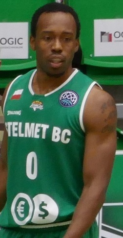 James Florence